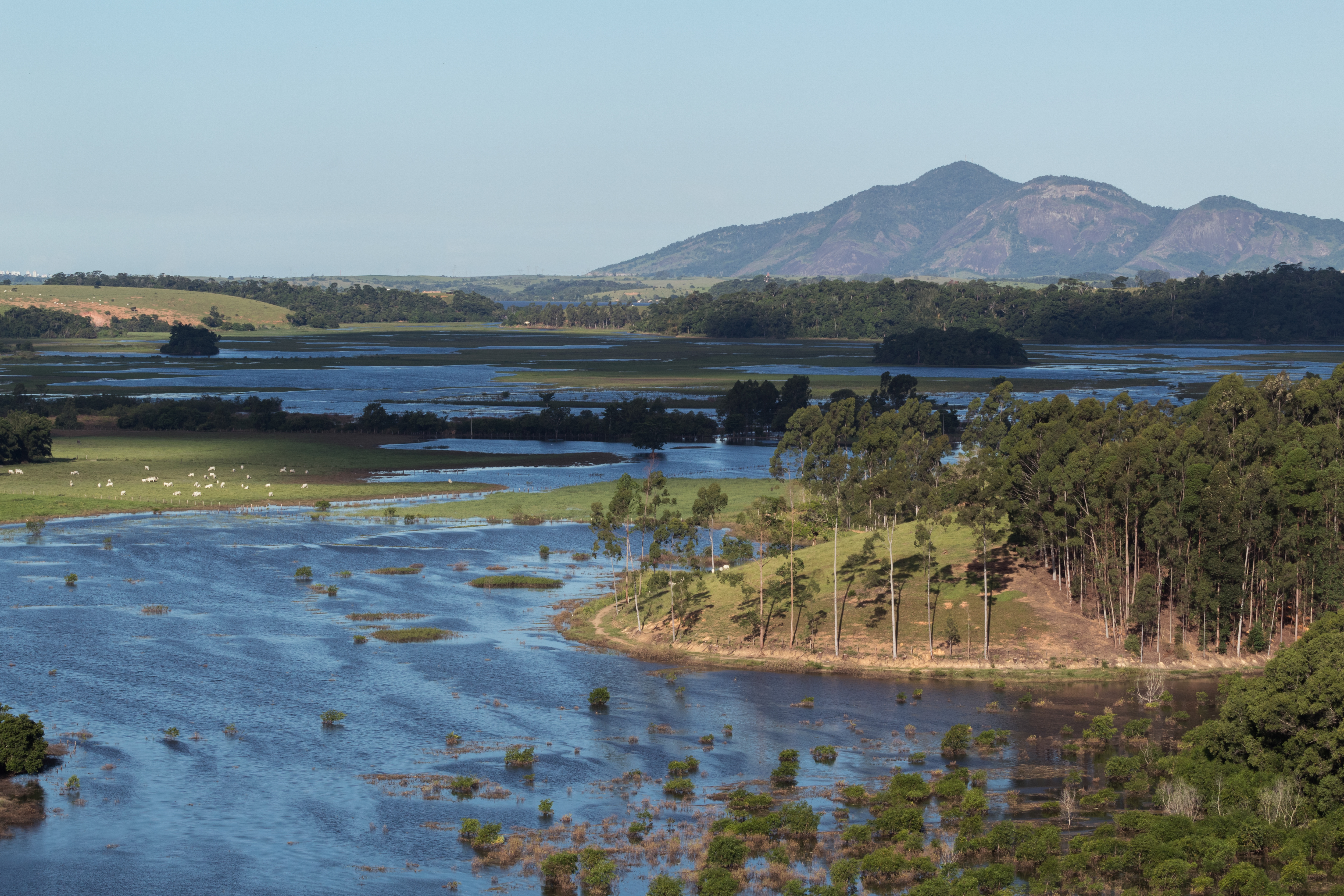 Em uma das Serras do Desengano no Imbé se tem essa vista. A vista desse entorno do Desengano e ao fundo o morro do Itaoca.